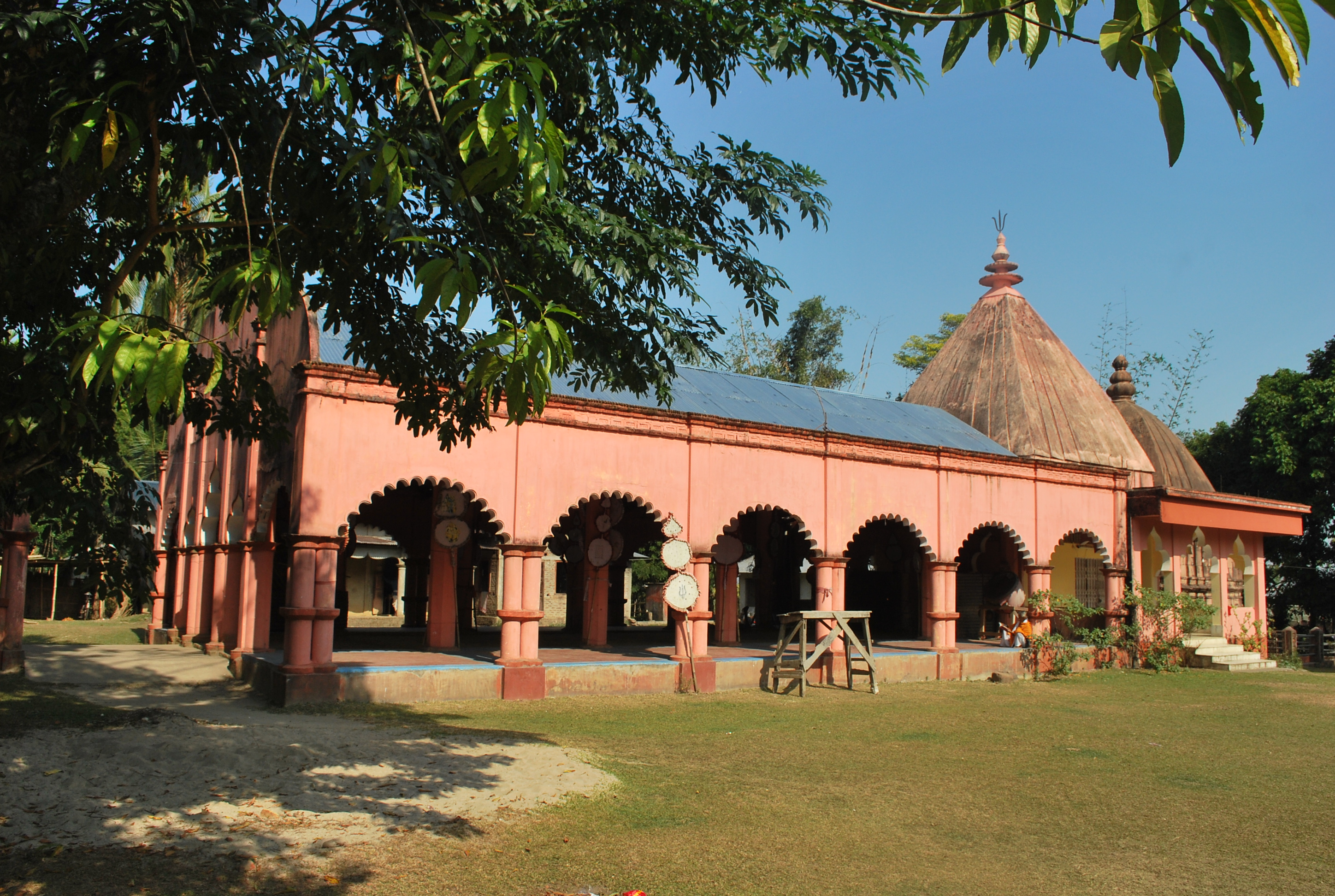 অসমীয়া: বিশ্বনাথৰ মুল মন্দিৰৰ চিত্ৰ।